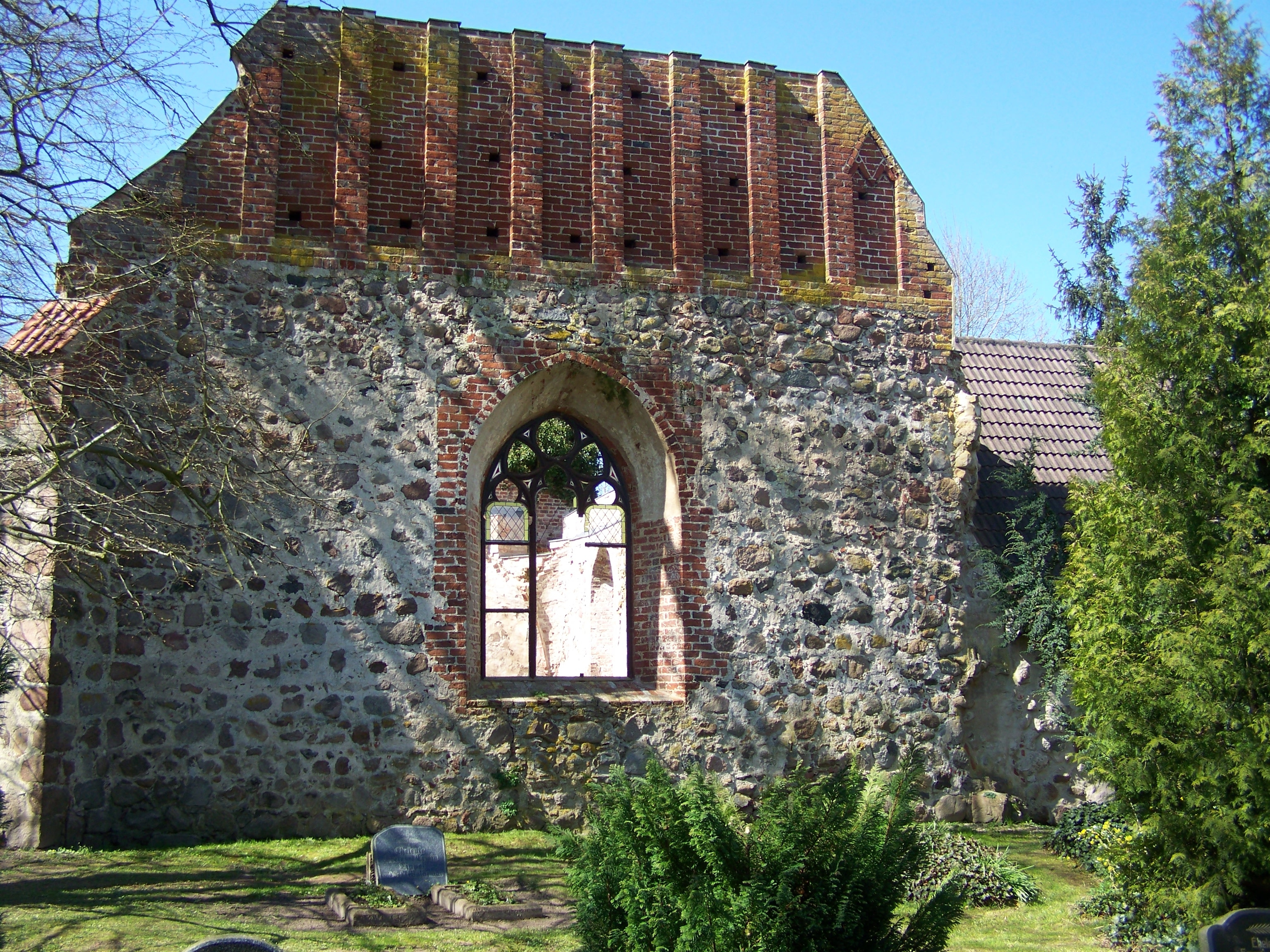 Roloffshagen, Kirchenruine (2008-04-20)